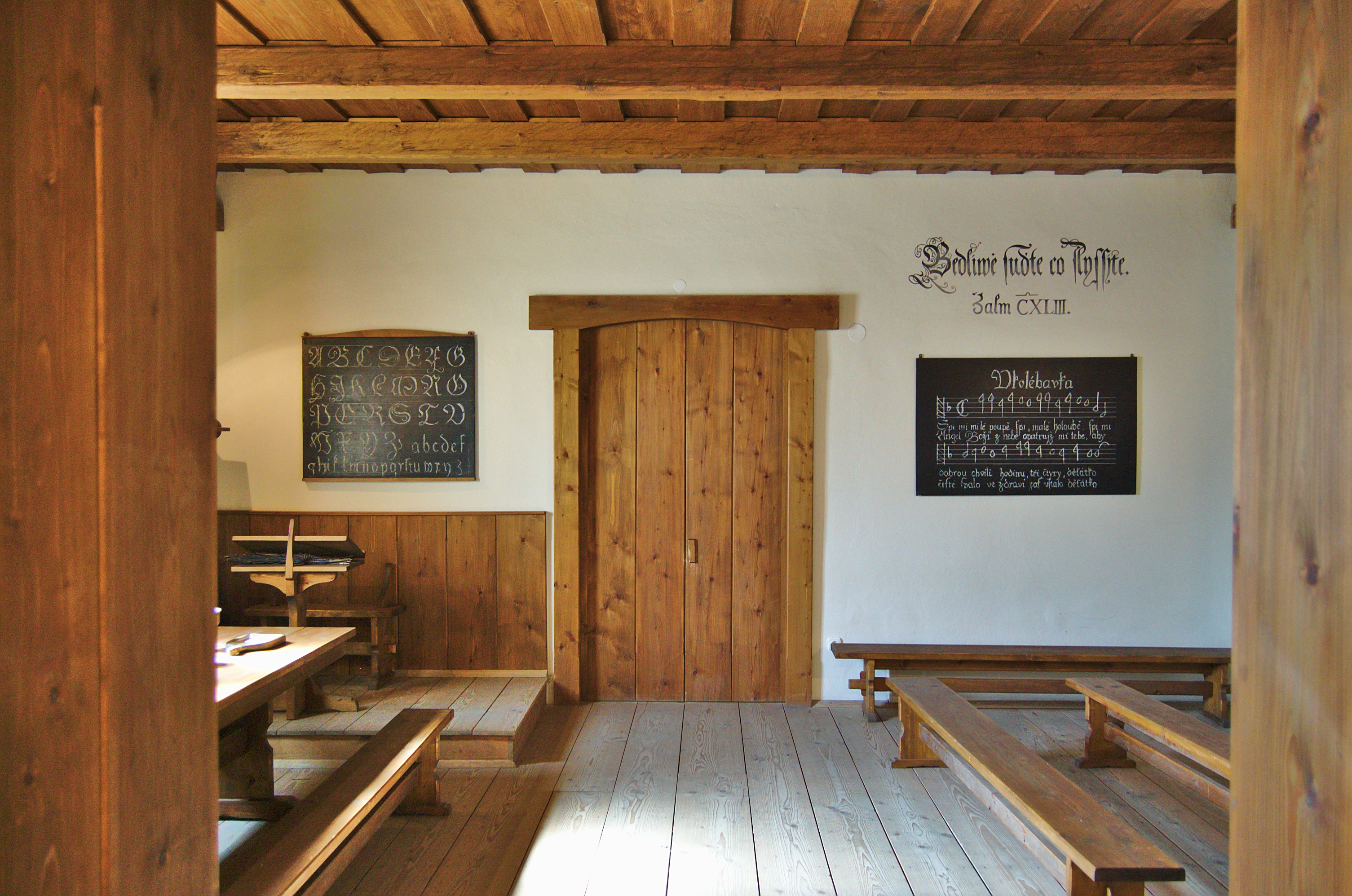 Muzeum Komenského - třída z doby J.A.Komenského, zámek, Přerov